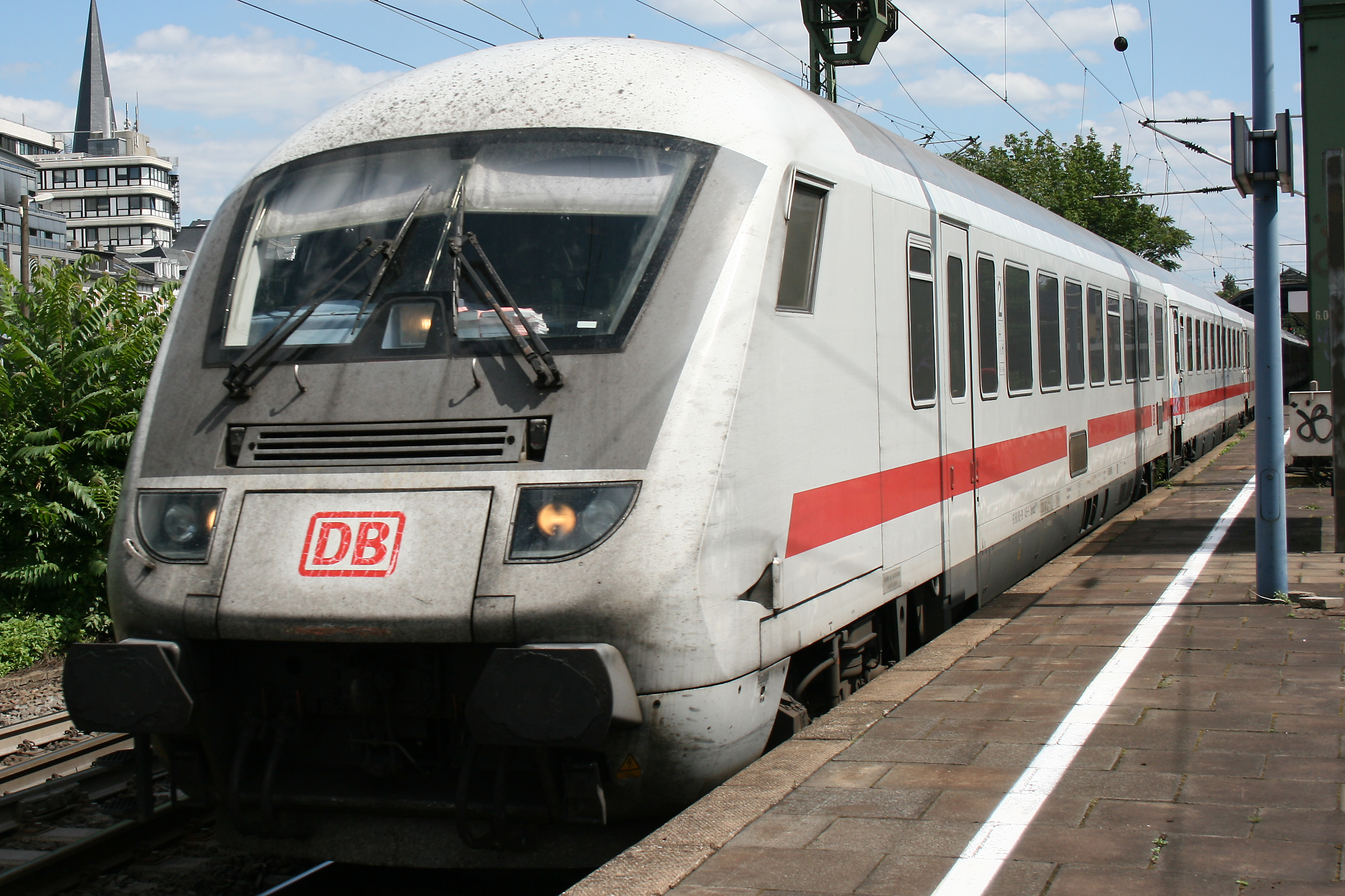 Ein typischer InterCity-Steuerwagen der DB AG